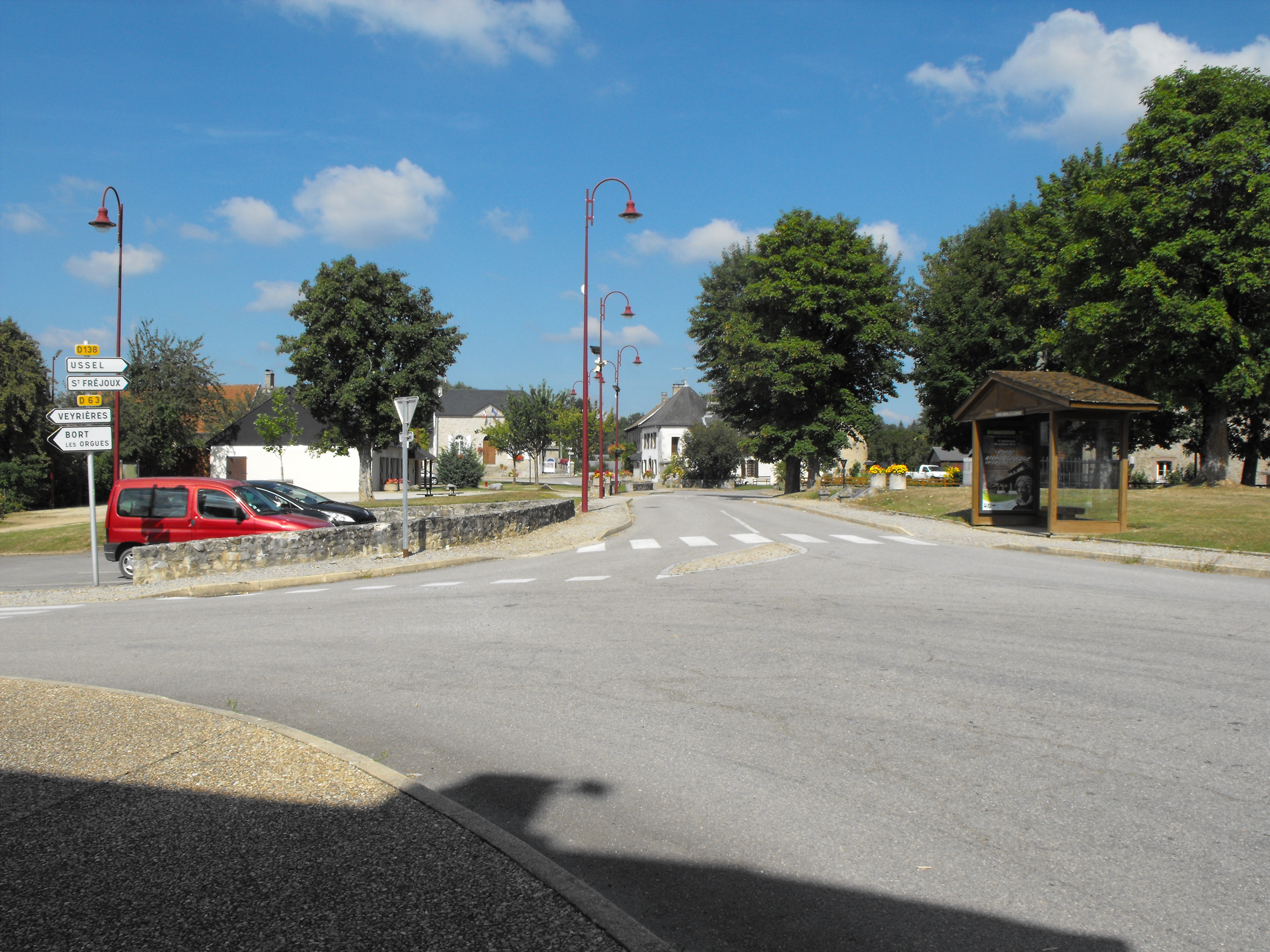 Le centre de Saint-Exupéry-les-Roches (mairie, salle des fêtes et le parc).